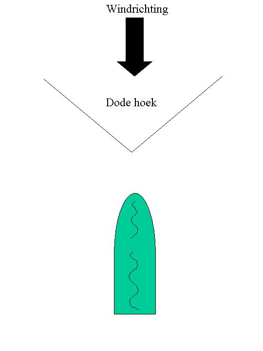 Eigen tekening, eerste probeersel. Author: Paul Hermans 9 jan 2004 12:07 (CET)